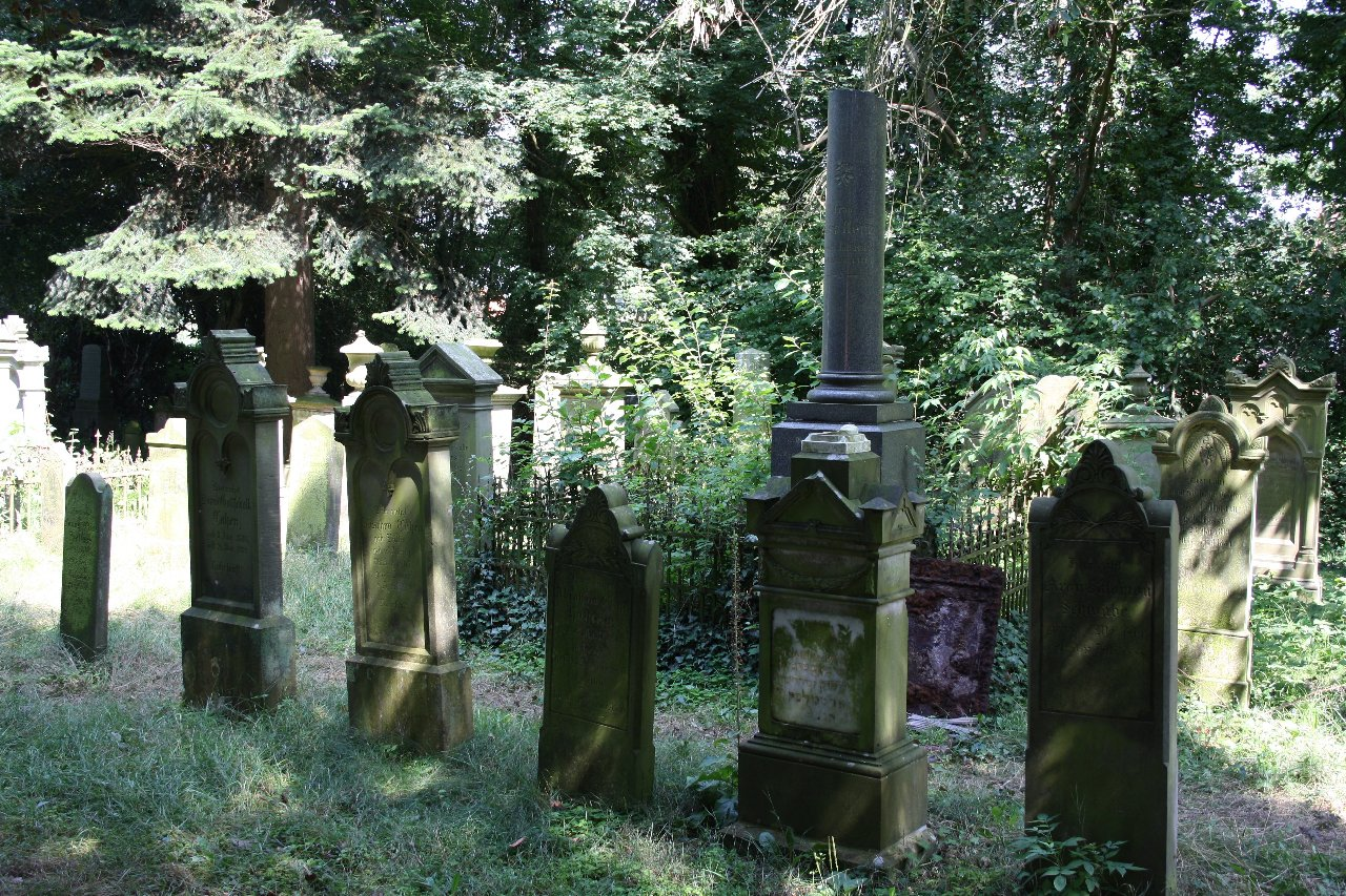 Jüdischer Friedhof Jever